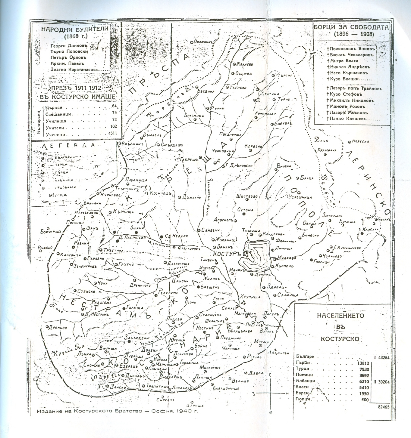 Карта на Костурско, издание на Костурското братство, 1940)